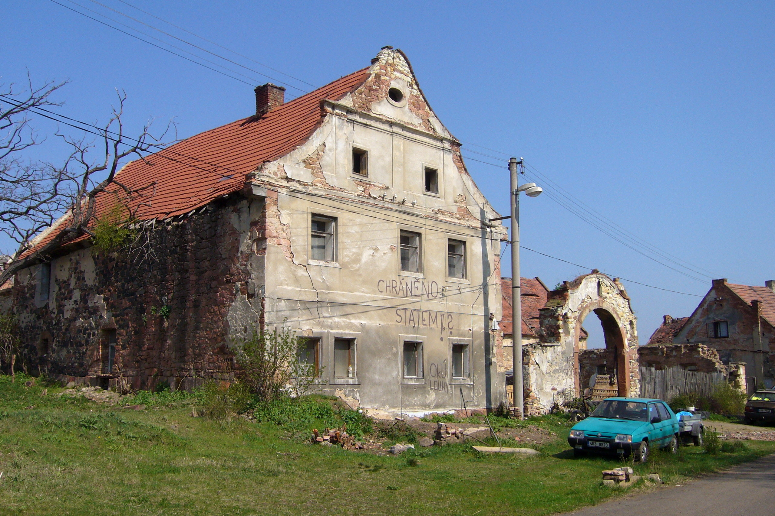 Venkovská usedlost (Zlovědice), Zlovědice 12, Zlovědice.